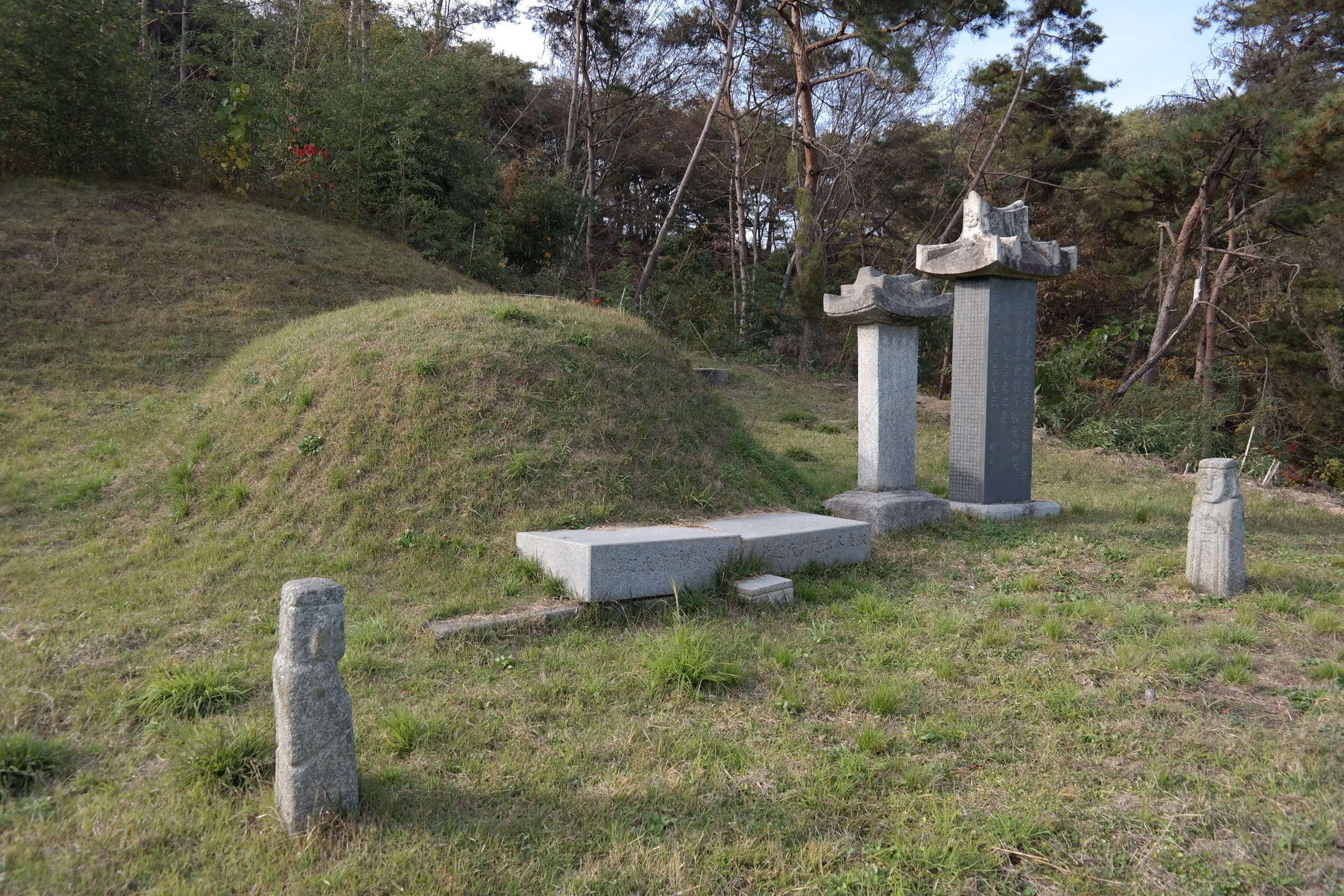 전북 순창군 유등면 오교마을에 있는 신경준의 무덤.